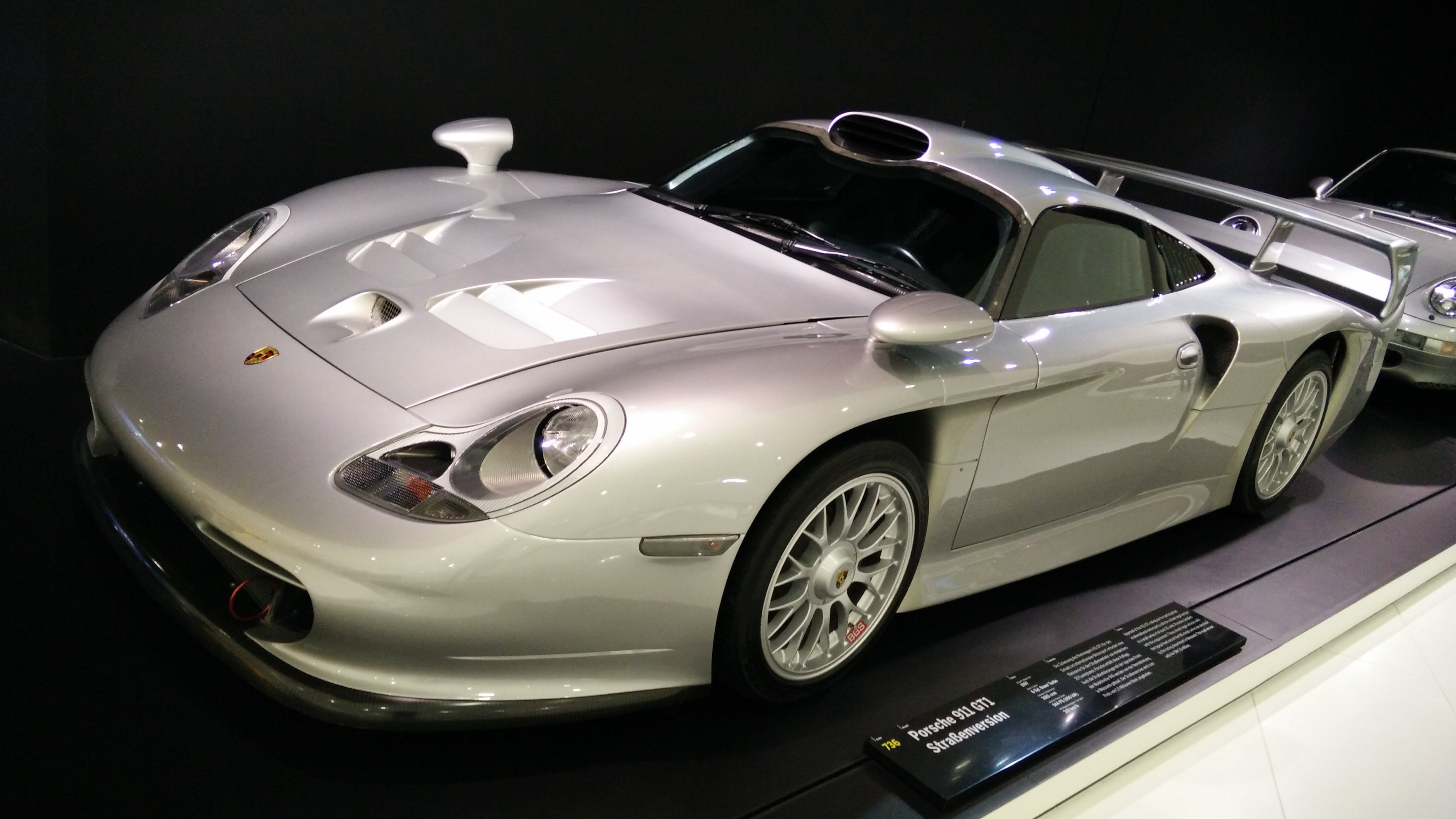 IMG_20141112_125109